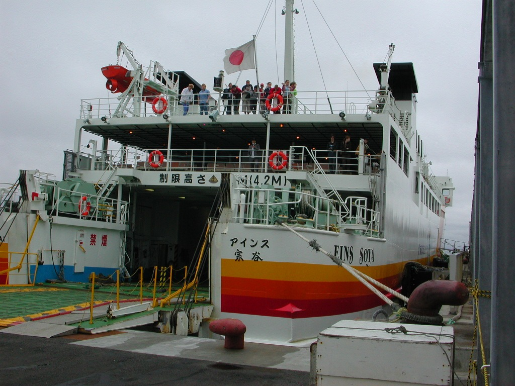 東日本海フェリー・アインス宗谷 稚内港 投稿者が撮影